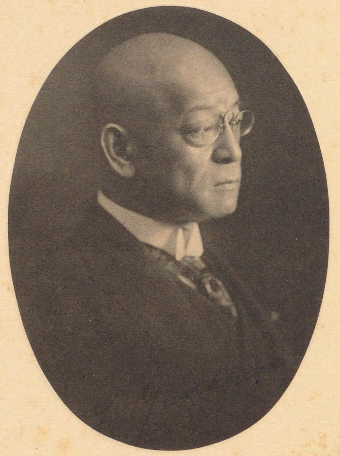 柳沢保恵（1871-1936）